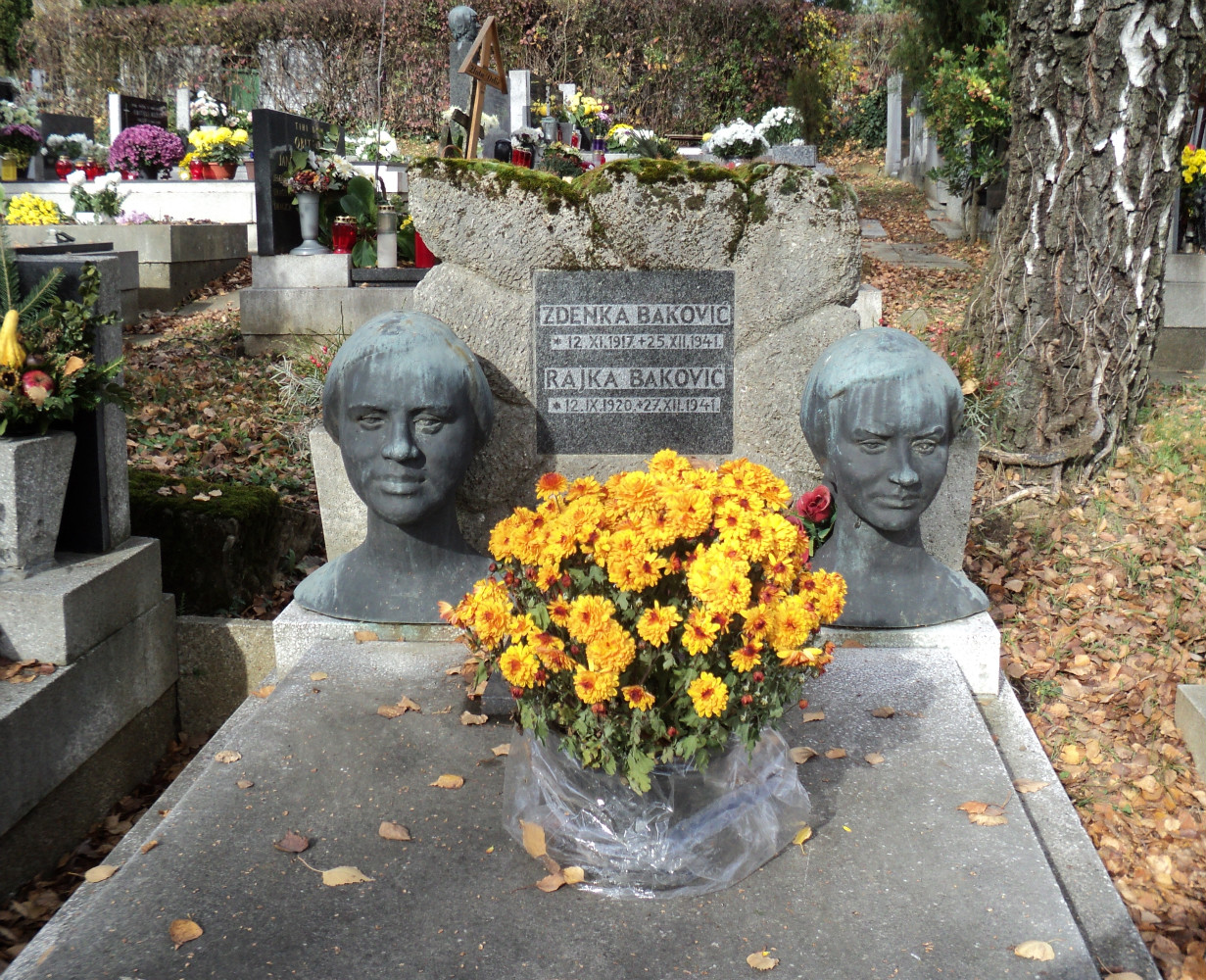 Grob sestara Baković